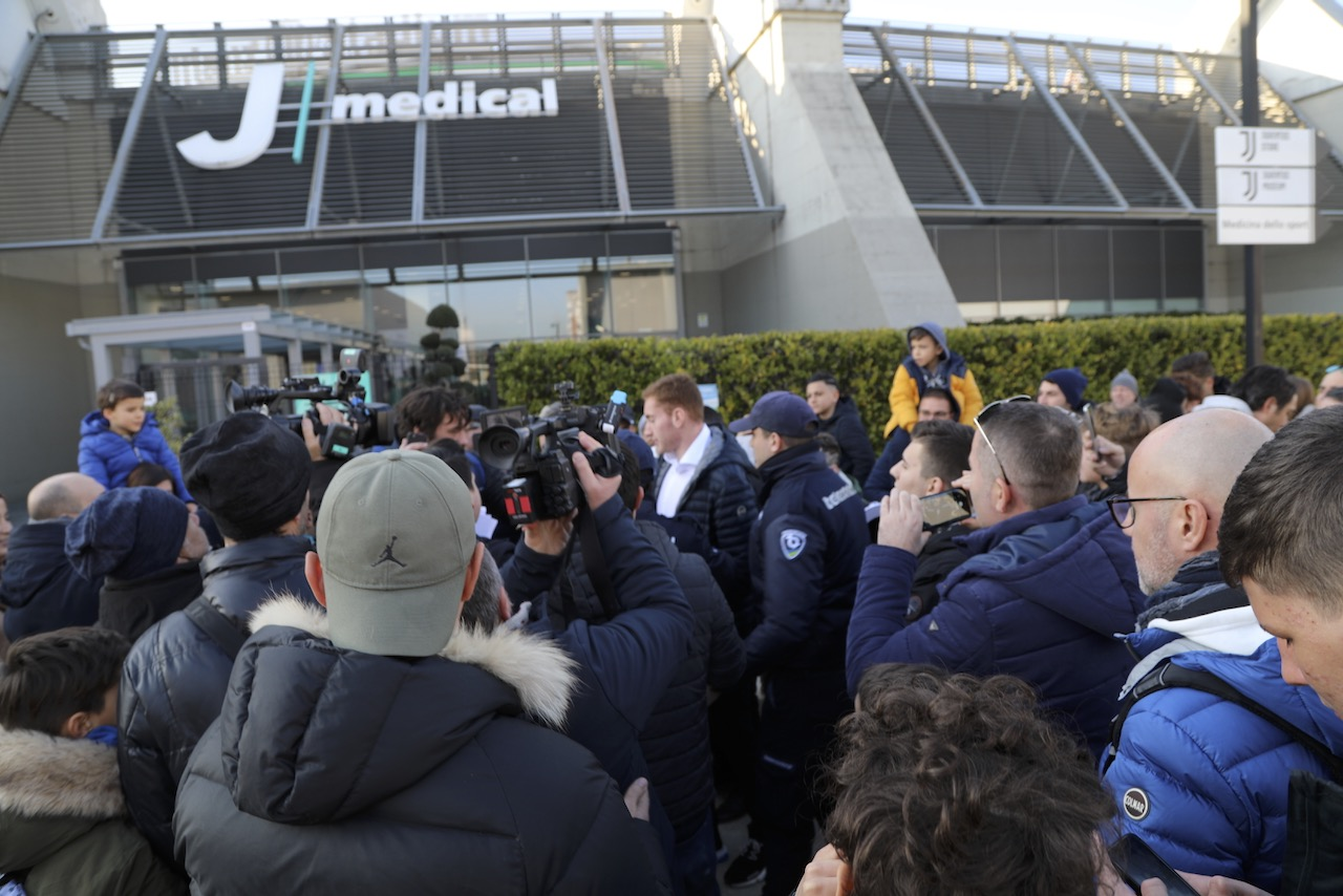 Arrivee de Dejan Kulusevski pour la visite medicale